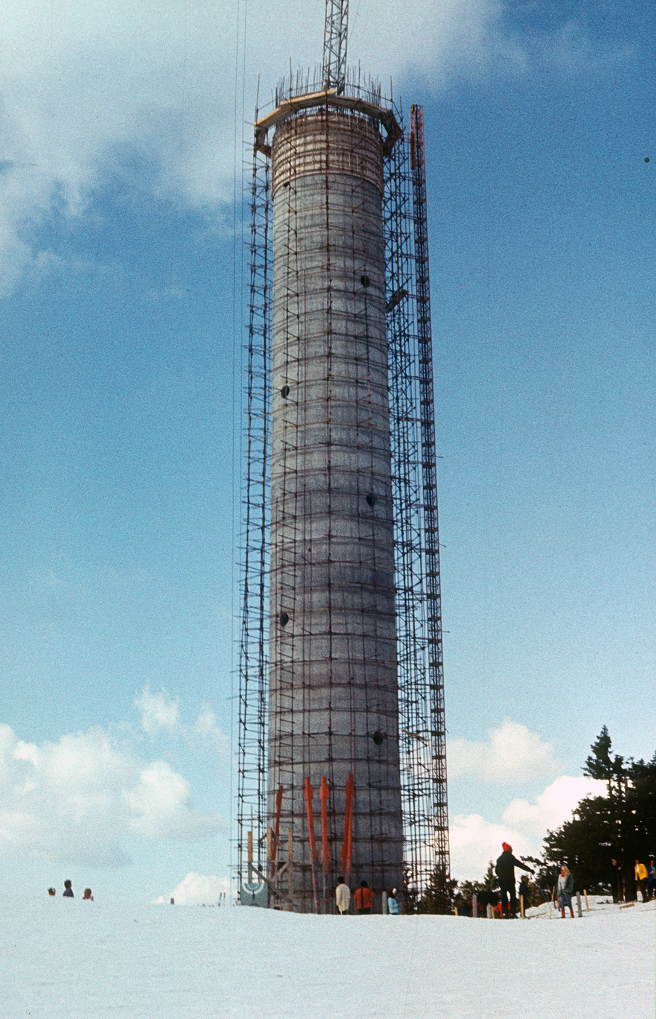 Bulgarien um 1970, wahrscheinlich Pamporovo Snezhanka